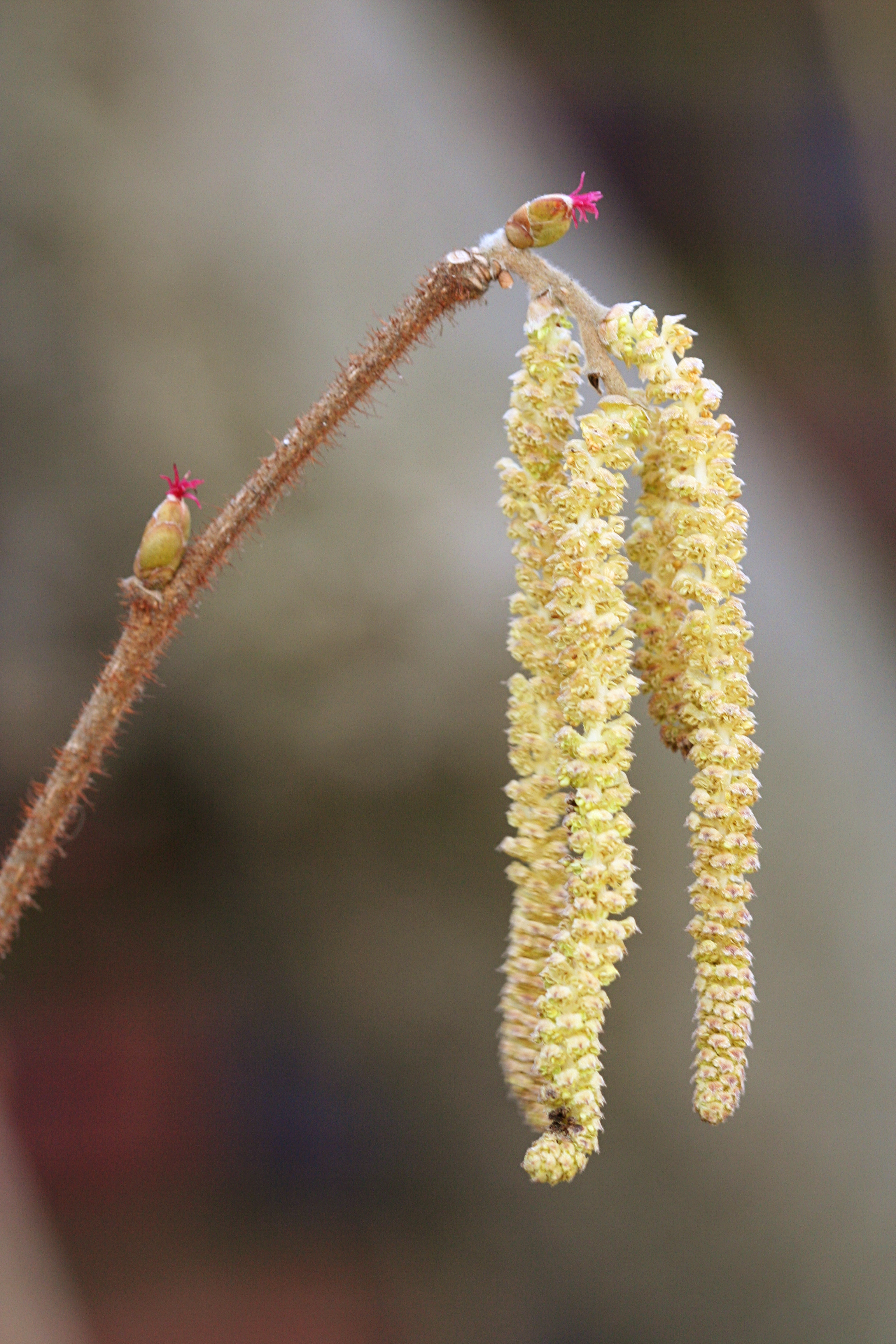 Hazelnut